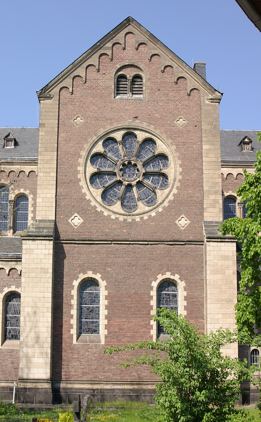 Teilansicht der kath. Pfarrkirche St. Martin, Engers Andere Versionen